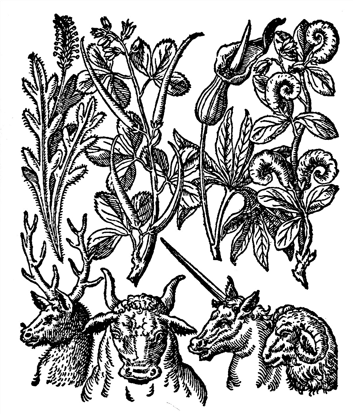 Illustration zur Theorie der Signaturenlehre. Der Holzschnitt zeigt eine Darstellung der Sympathien zwischen Pflanzen und Tieren nach Giambattista della Porta (16. Jahrhundert)